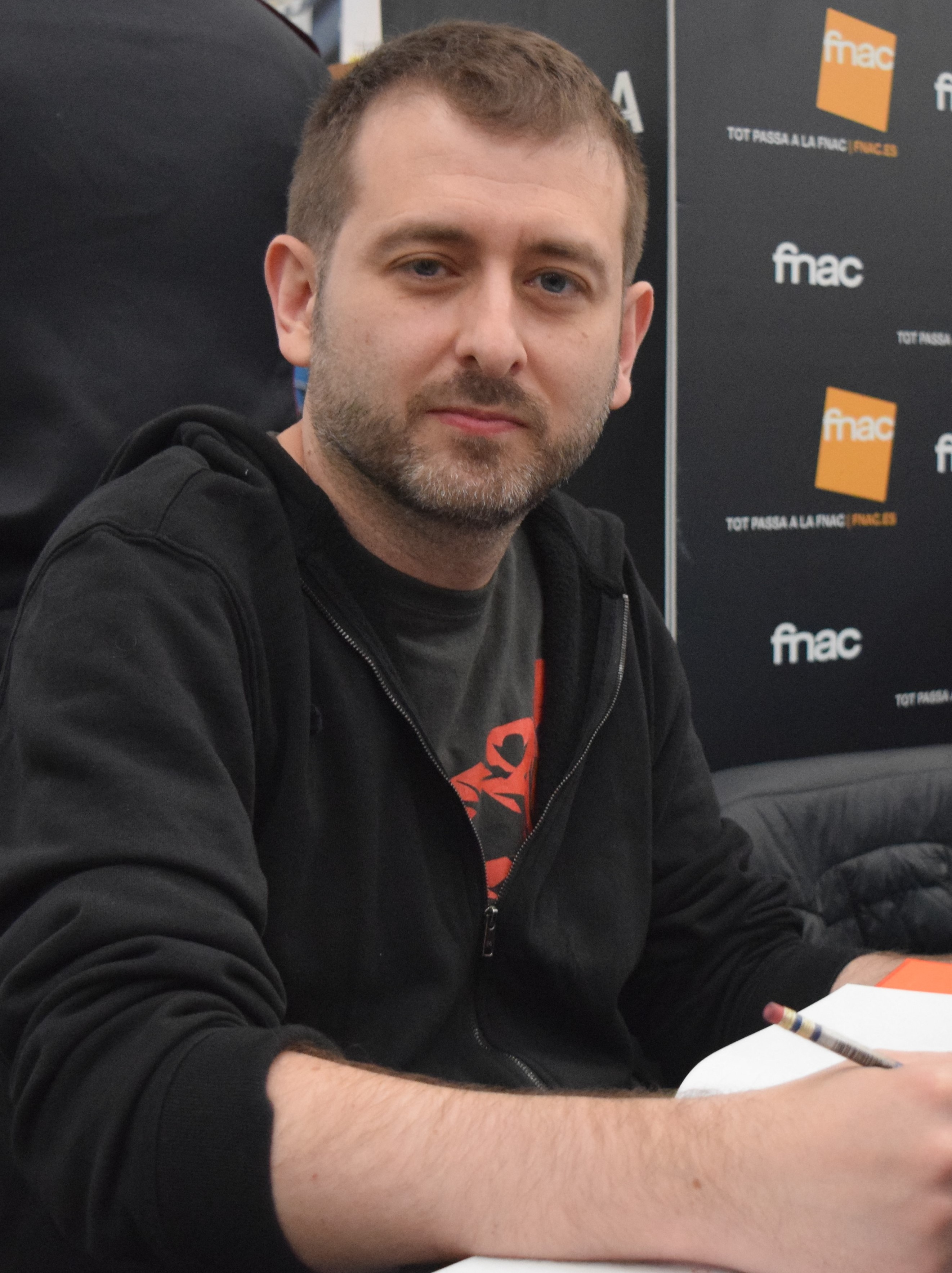 El dibuixant de còmic valencià Víctor Santos firmant i dedicant còmics durant el 37 Còmic Barcelona, 2019.